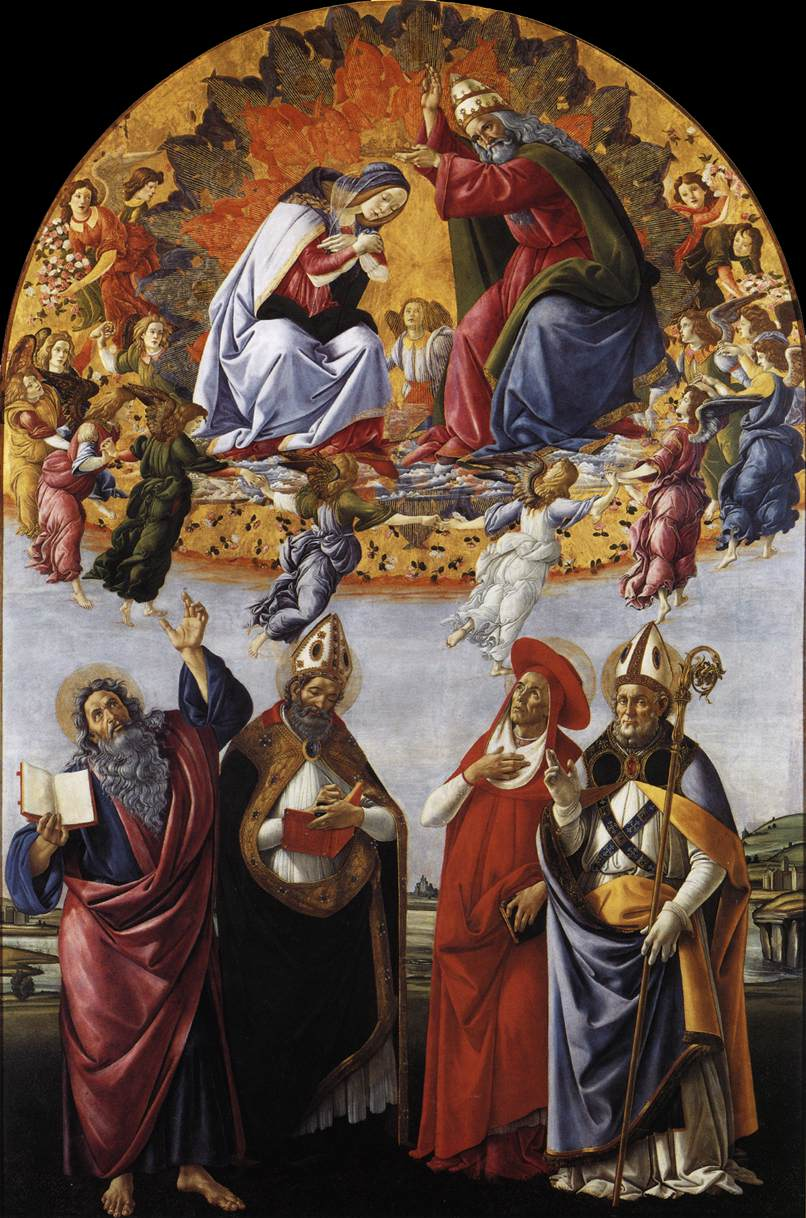 BOTTICELLI, Sandro Coronation of the Virgin (San Marco Altarpiece) Tempera on panel, 378 x 258 cm Galleria degli Uffizi, Florence